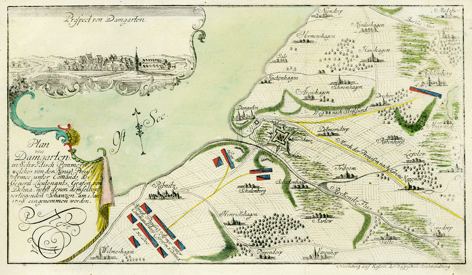 Plan von Damgarten 1759, aus: Christoph Gottlieb Richter: Gespräch im Reich der Todten, zwischen dem fürtreflichen Helden, August Wilhelm, Prinzen von Preussen, und der mit ausnehmend edlen Eigenschaften begabten Fürstin Anna ... in welchem die Historie des gegenwärtigen Kriegs ... ordentlich und deutlich beschrieben wird, Band III, Frankfurt und Leipzig, 1759-60. "Plan von Damgarten in Schwedisch Pommern welches von der Königl. Preuss. Armee unter Commande des General Lieutenants Grafen von Dohna nebst denen demselben vorliegenden Schanzen am 1 Jan 1739 eingenommen worden."